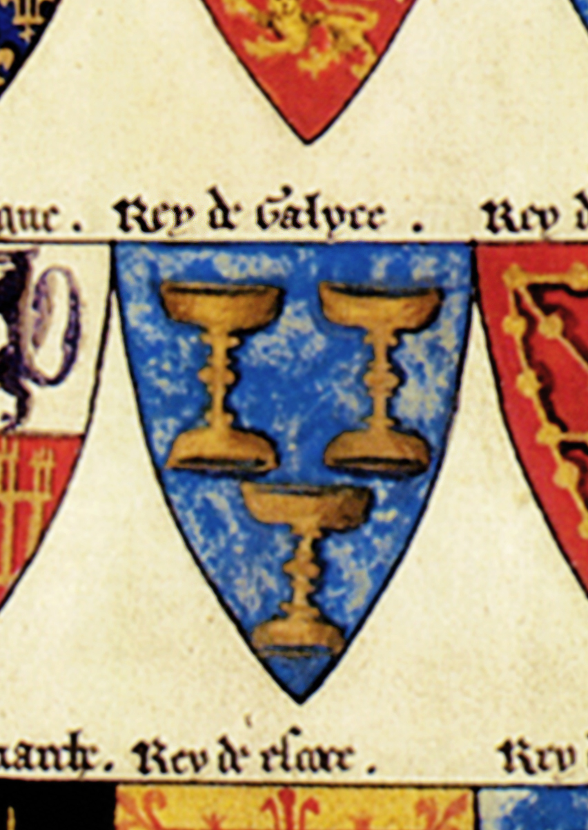 Representación do escudo do "rey de Galyce" no armorial inglés coñecido como "Segar´s Roll". Realizado no ano 1282 loce un listado de escudo entre os que se atopa este alusivo ao "rey de Galyce" flanqueado por un escudo do "rey de Espagne" e outro do "rey de Navarre".